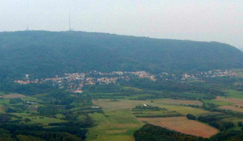 Dannenfels am Fuße des Donnersberg bei schlechtem Wetter. Im Vordergrund der Flugplatz